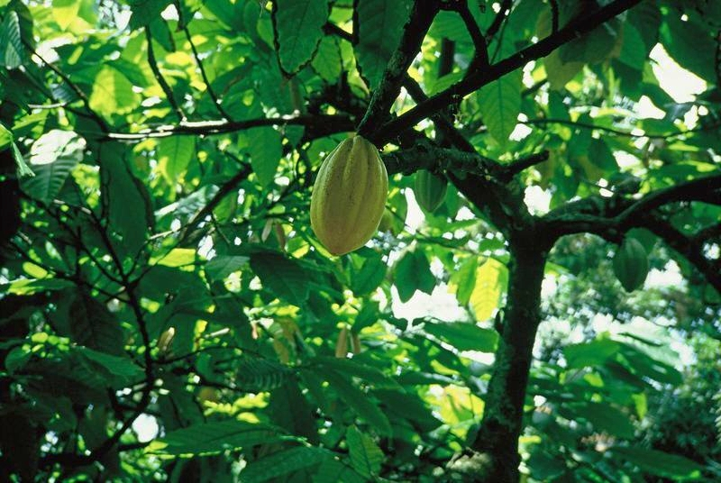 Cacao, Brazil, Ilheus